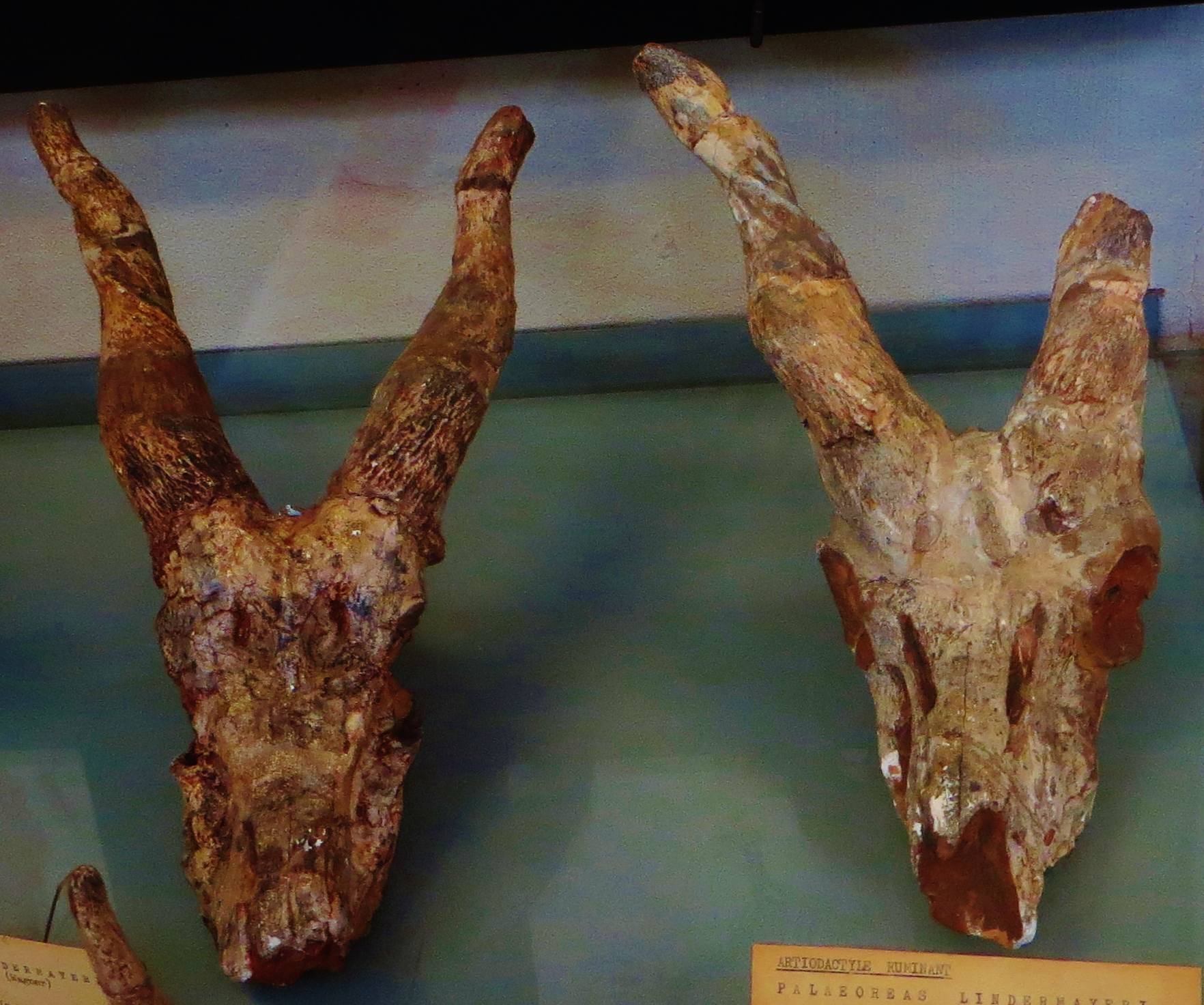 Fossil of Palaeoreas, an extinct mammal- Took the photo at Musee d'Histoire Naturelle, Paris